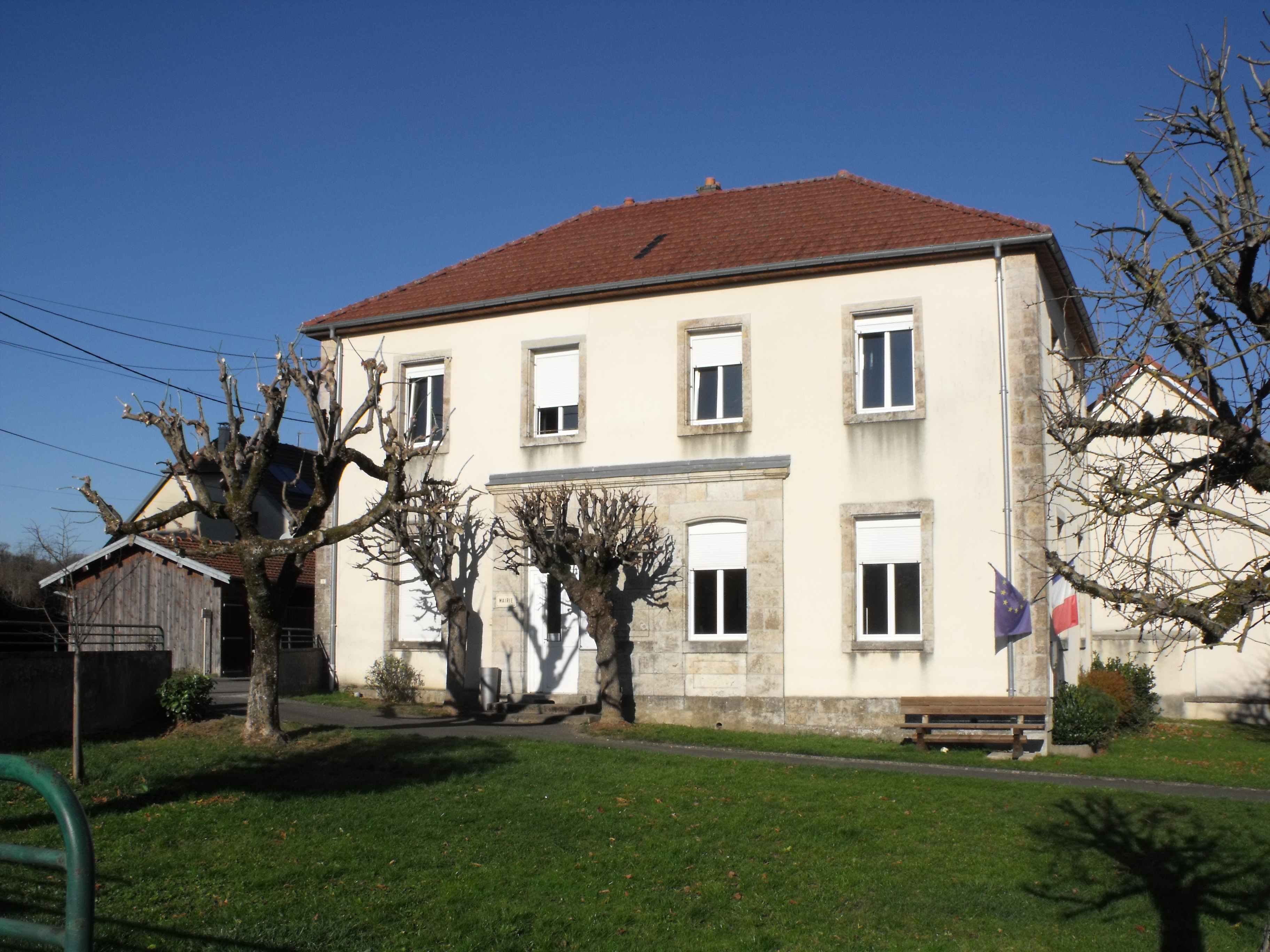 Mairie de Geney, Doubs, France